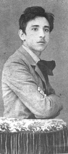 Luigi pirandello a 17 anni.